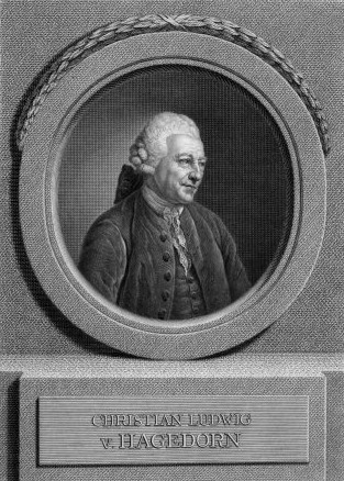 Porträt Christian Ludwigs von Hagedorn, Kupferstich